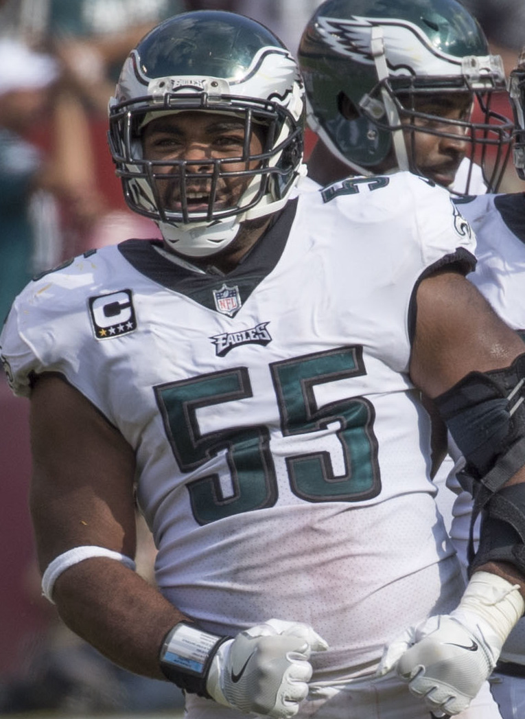 Eagles at Redskins 9/10/17